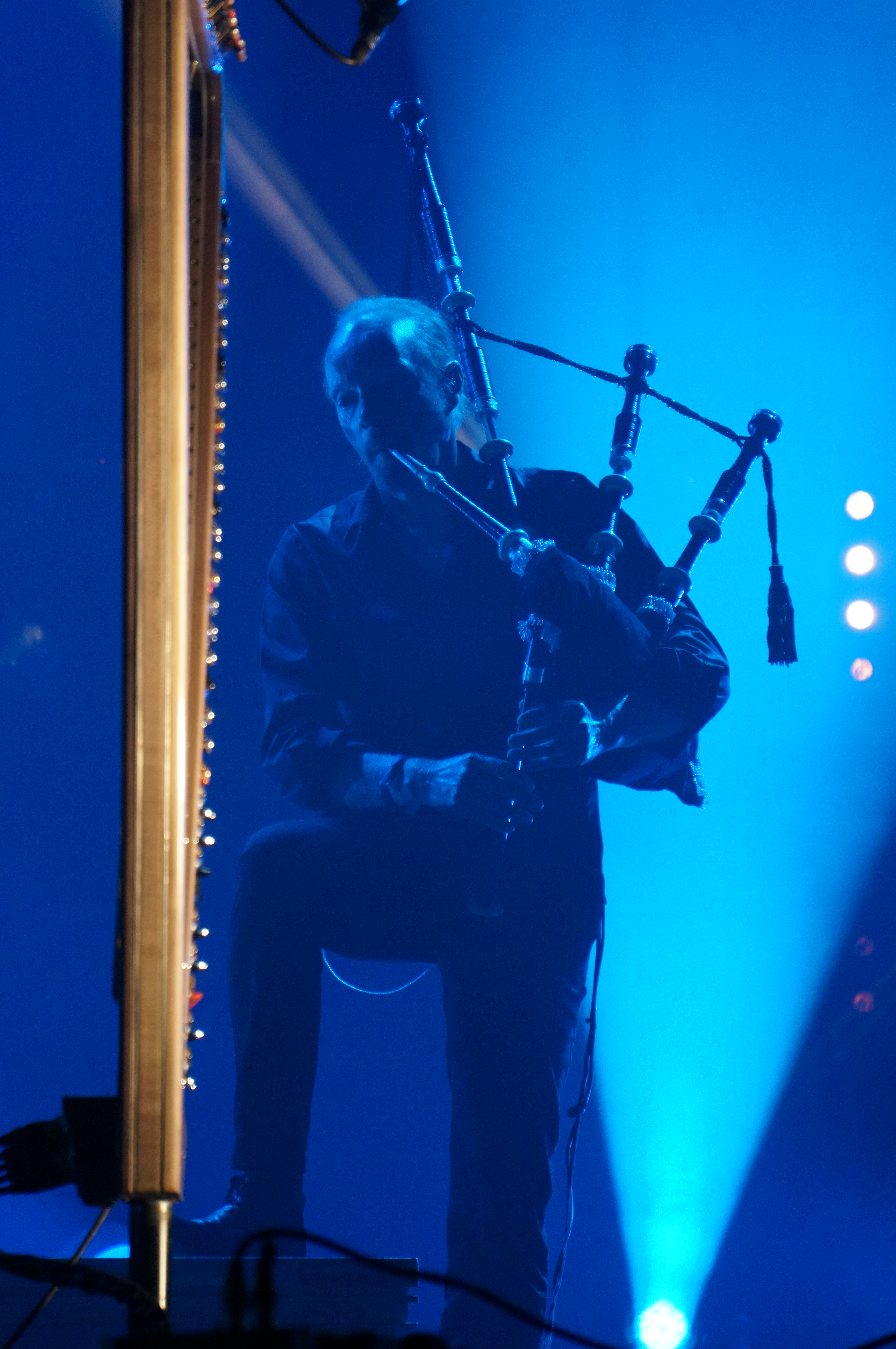 lors ud concert à la foire de chalons.